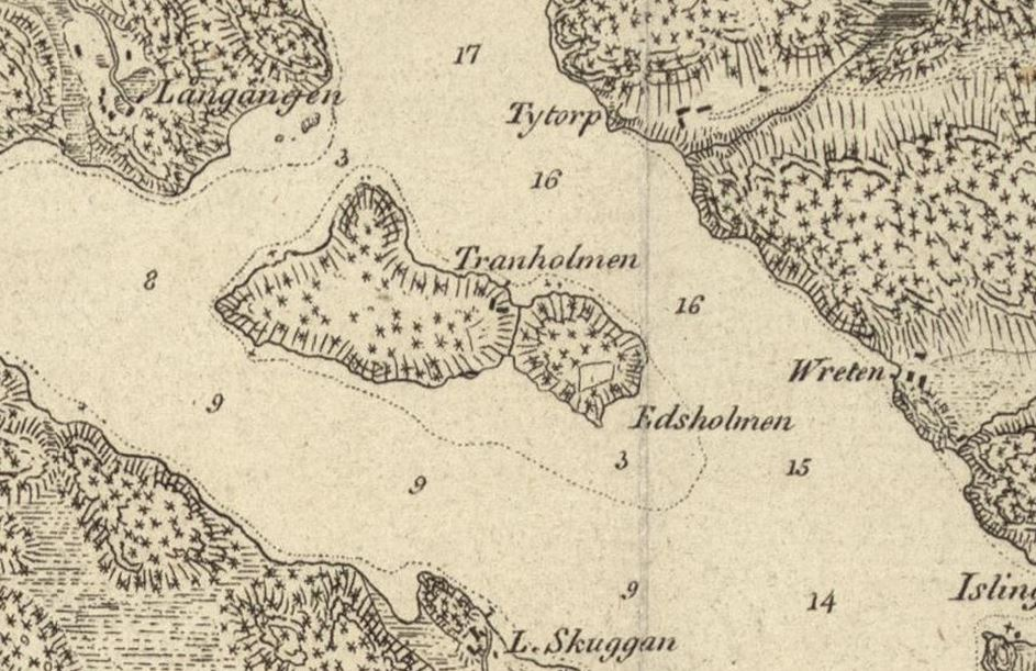 Tranholmen på 1817 års karta över Stockholm med omgivningar